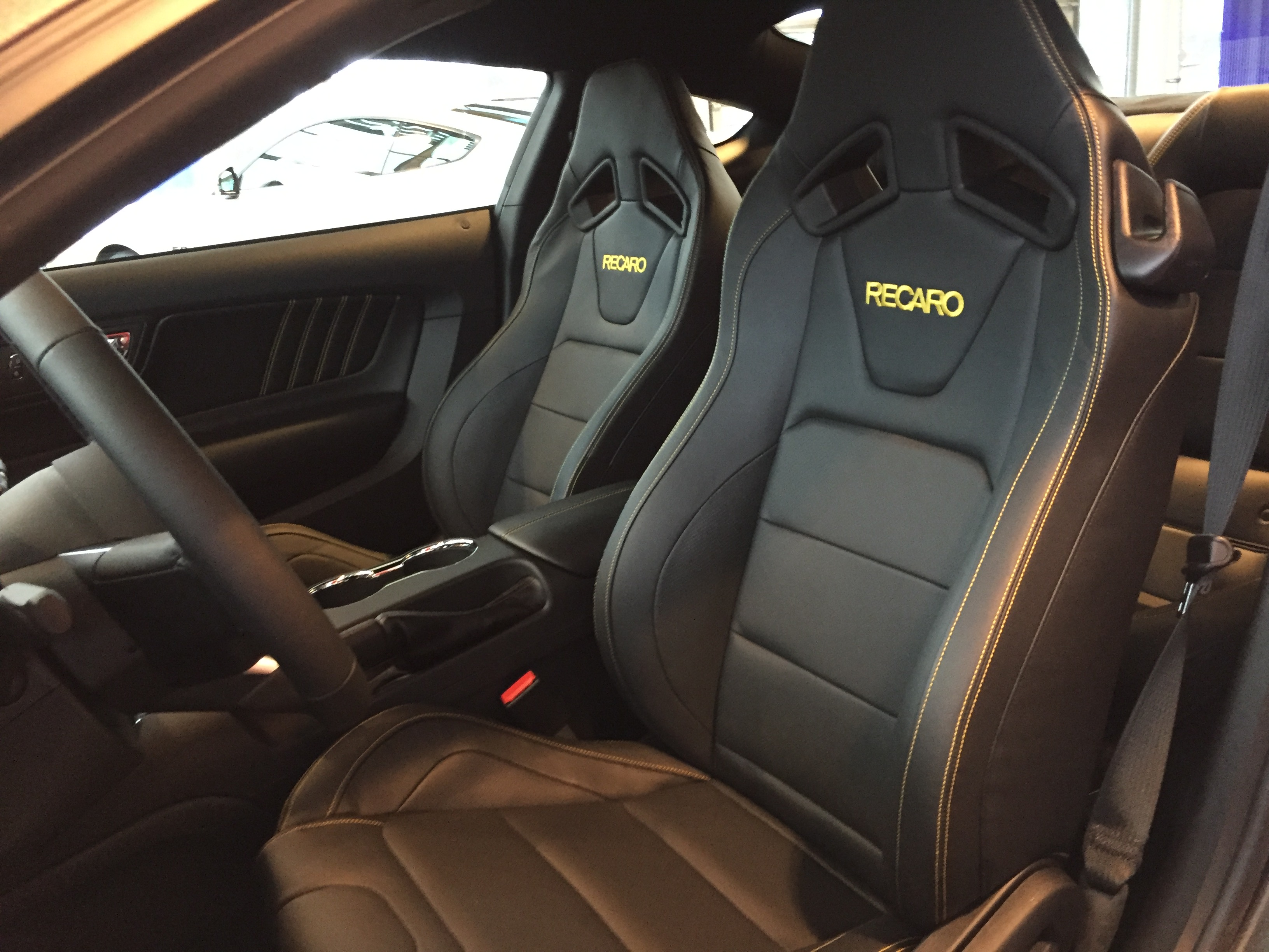 Innenraum Ford Mustang GT mit Recaro-Sitzen